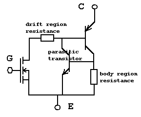 IGBT equivalent circuit